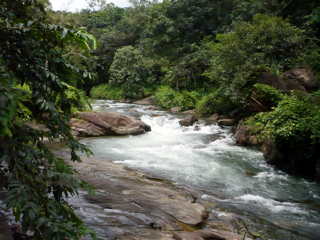 മീനച്ചിലാര്‍, പൂഞ്ഞാറില്‍നിന്ന്